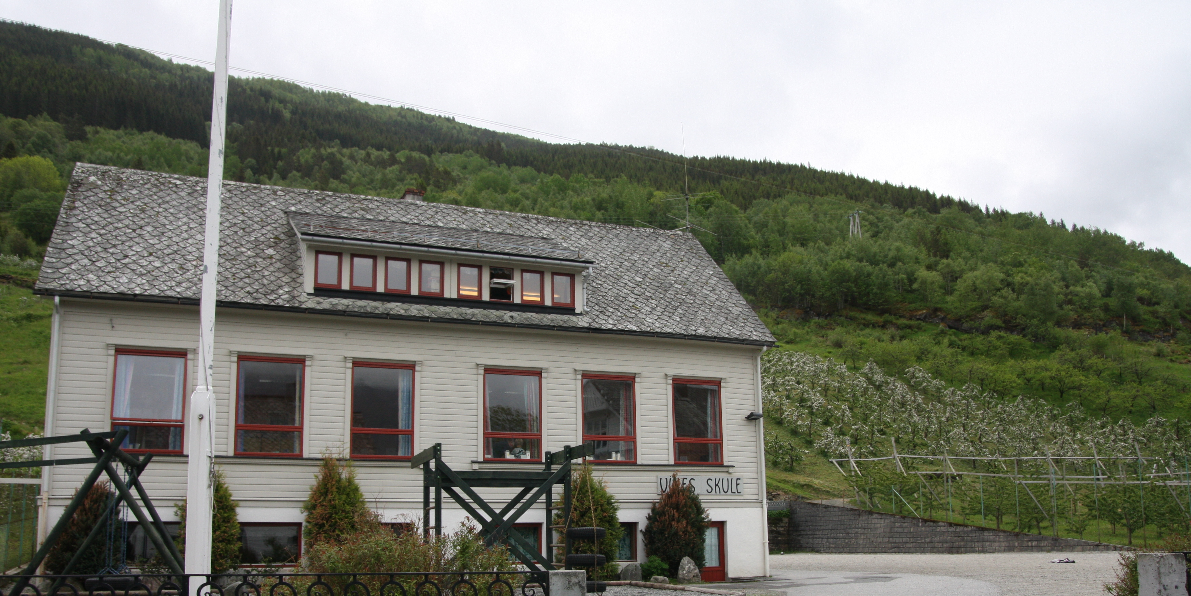 Vines skule